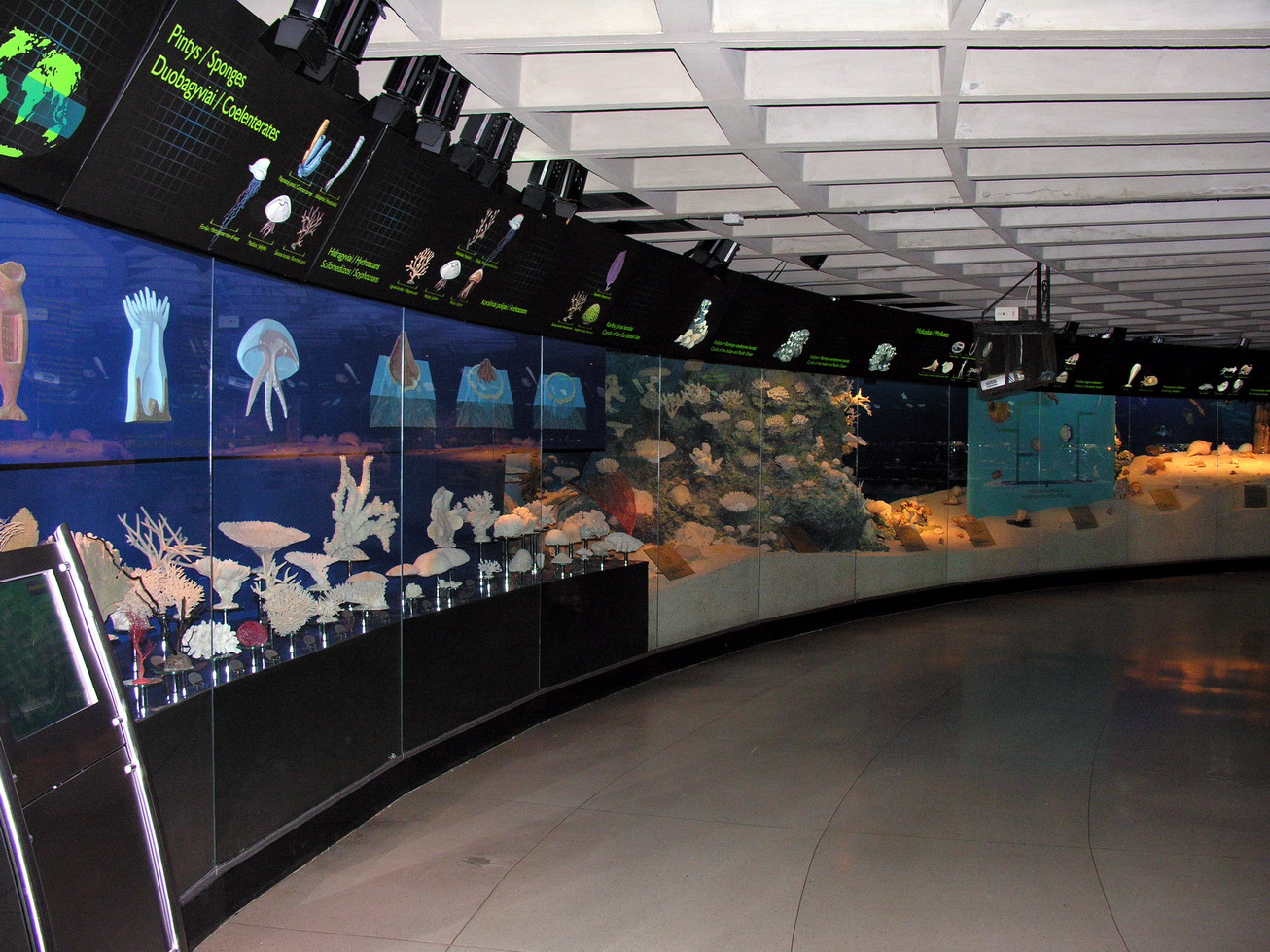 Lietuvos jūrų muziejus Foto: Algirdas, 2006 m. birželio 29 d.